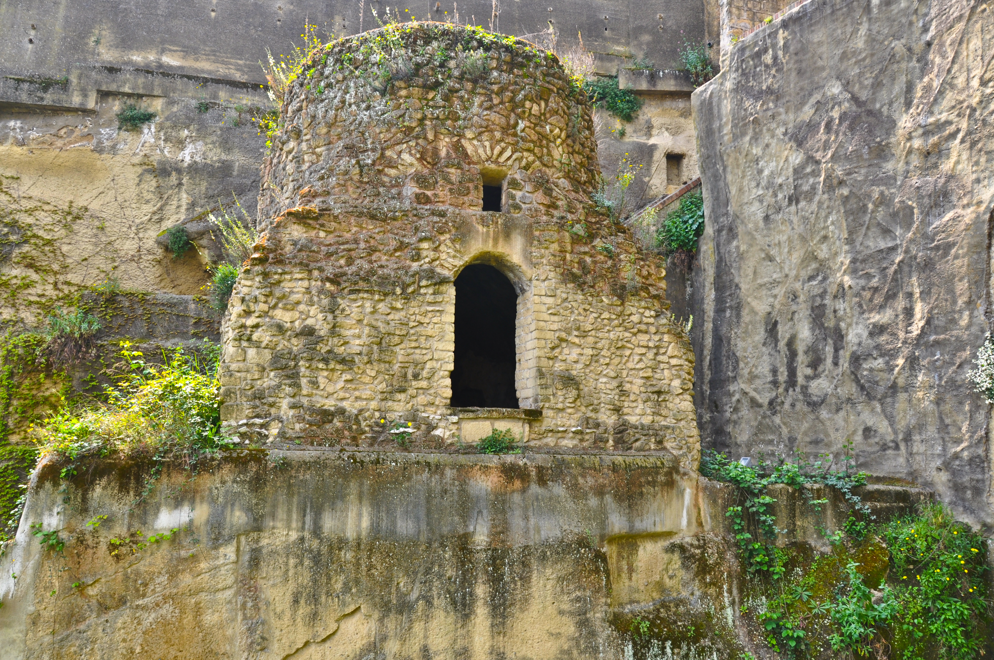 Sepolcro di Virgilio, Napoli